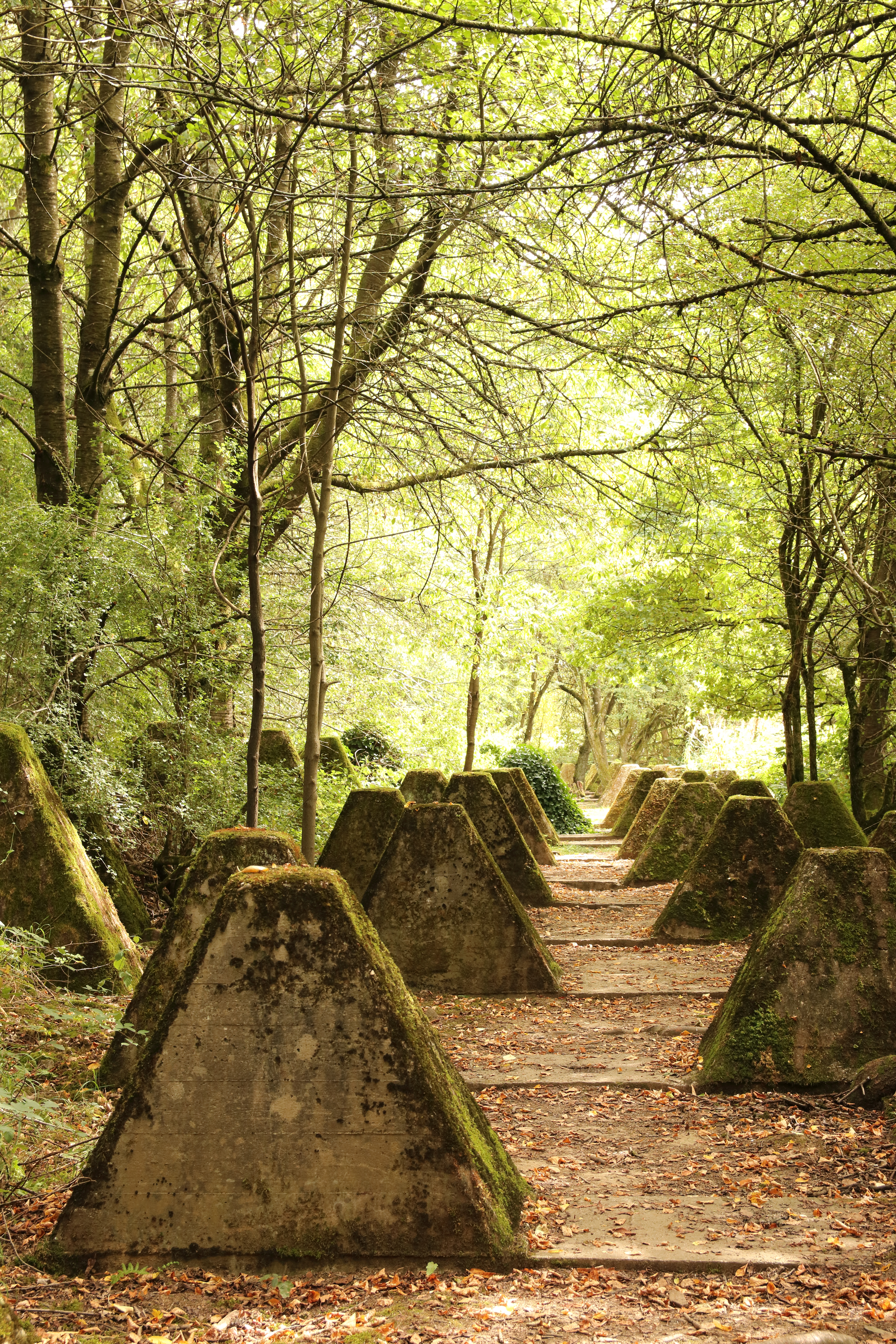 Wanderweg Höckerlinienpfad am Orscholzriegel